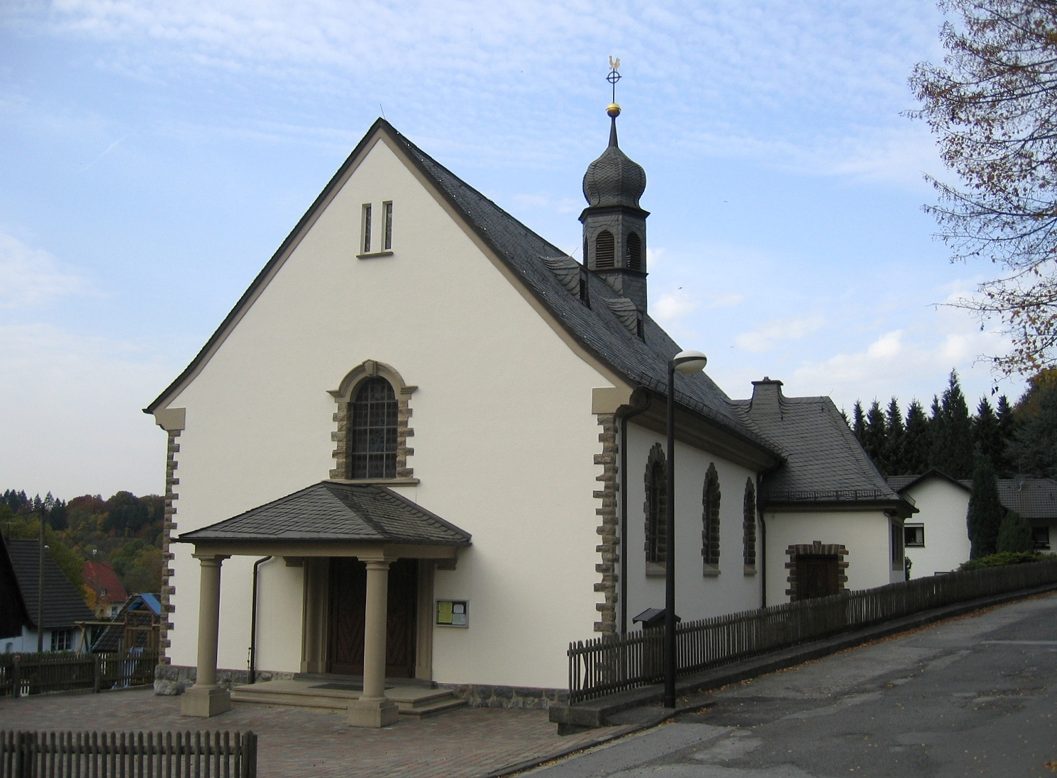 Kapelle St. Michael (renoviert im Jahr 2002) in Balve-Volkringhausen.